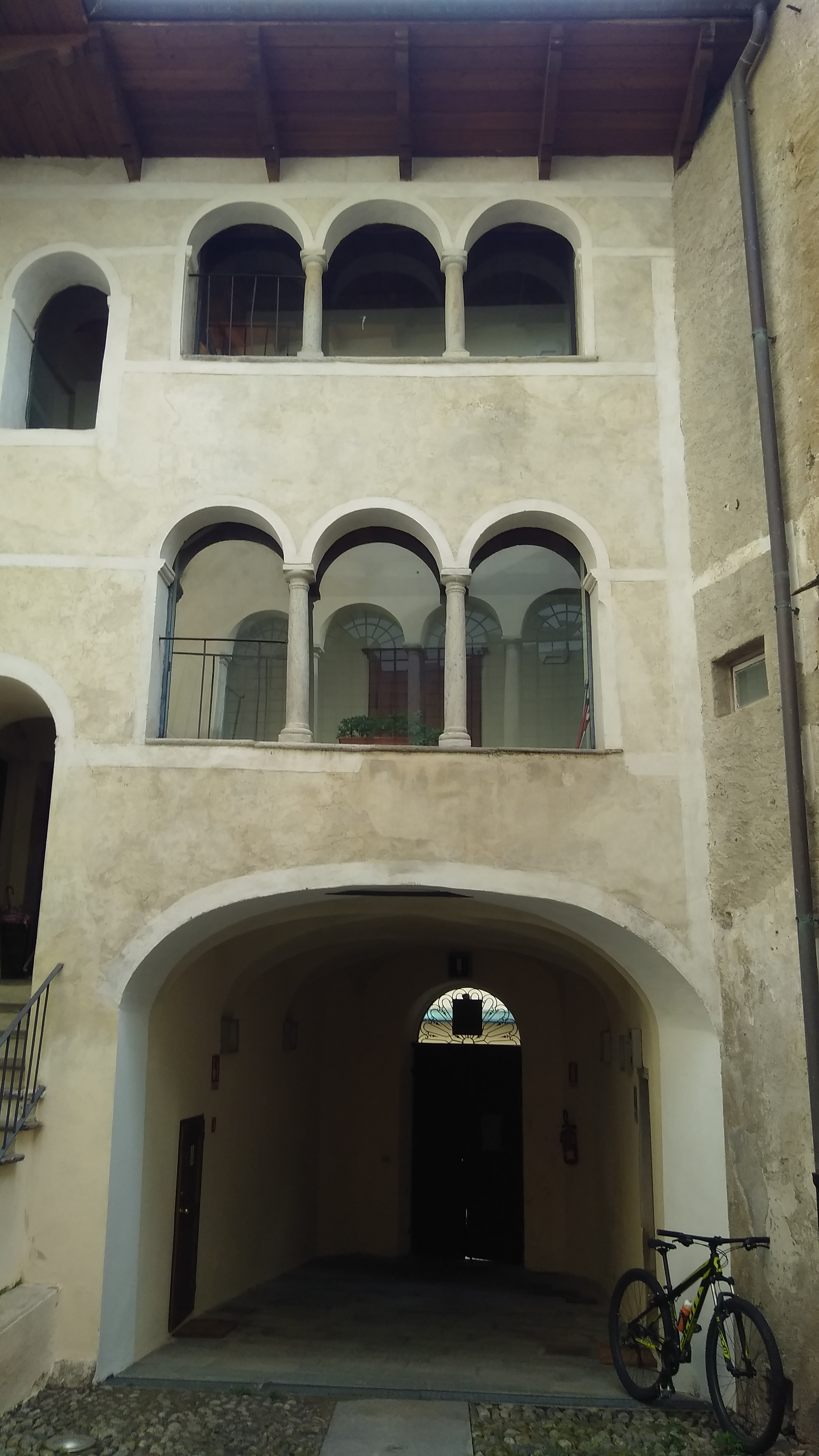 Palazzo dei Musei (Varallo): cortile interno